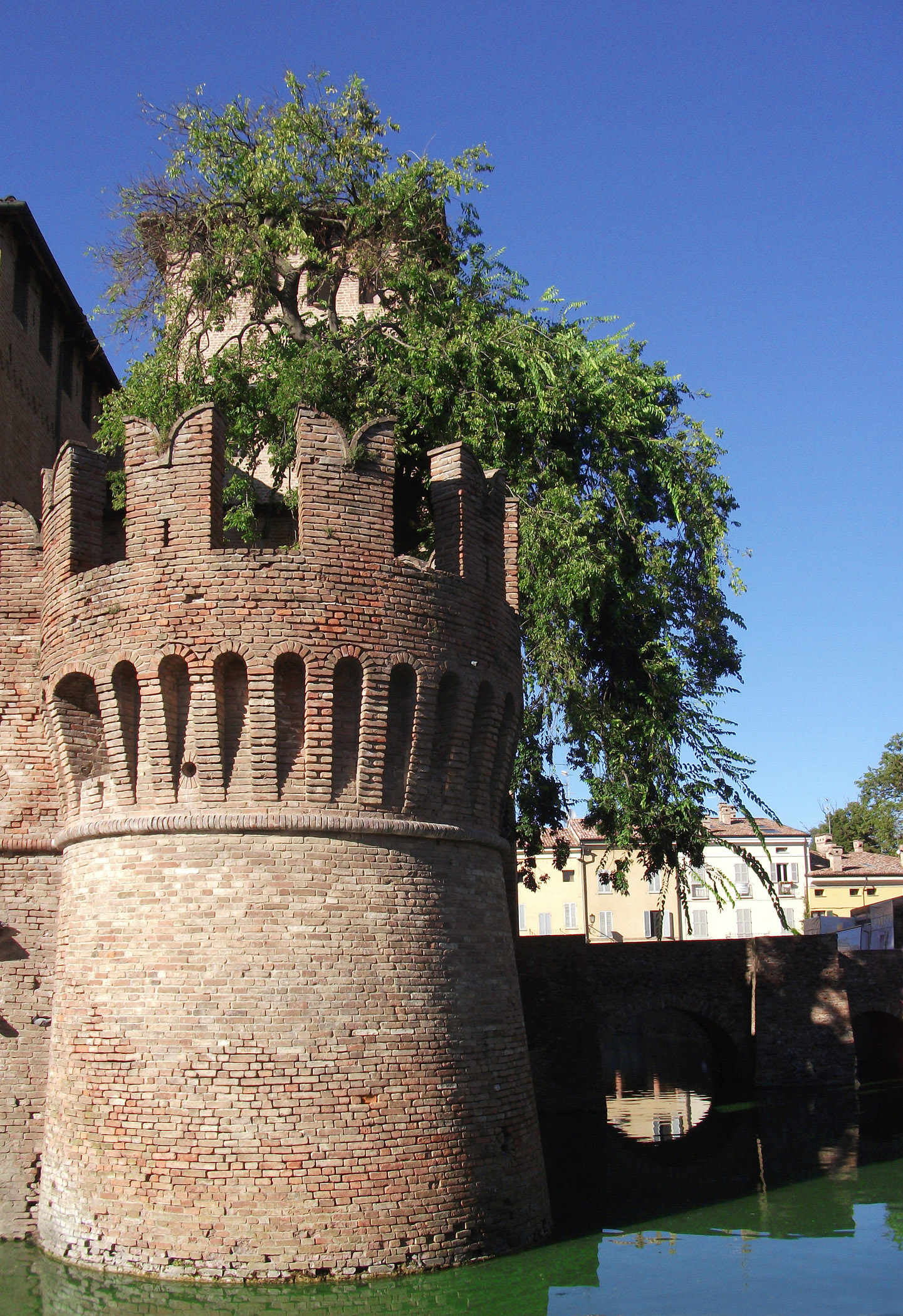 rocca Sanvitale - Torre e fossato This is a photo of a monument which is part of cultural heritage of Italy.